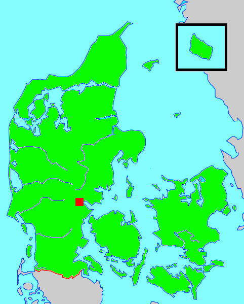 Kort sem sýnir staðsetningu Vejle í Danmörku.